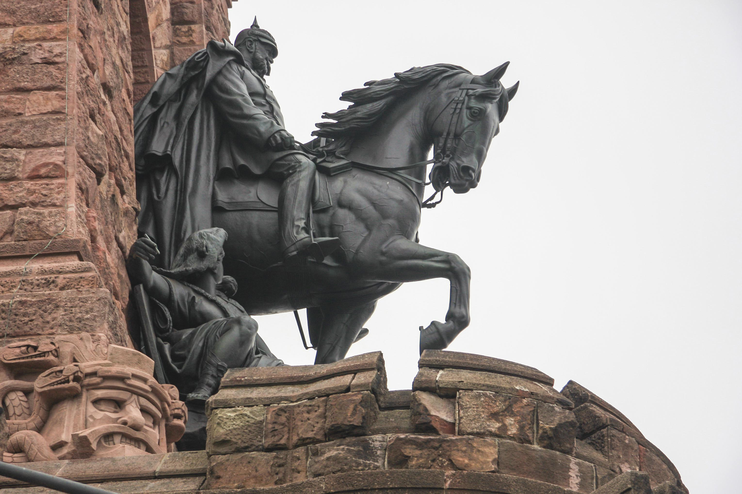 wird auch als Barbarossadenkmal (Kaiser-Wilhelm-Denkmal) bezeichnet